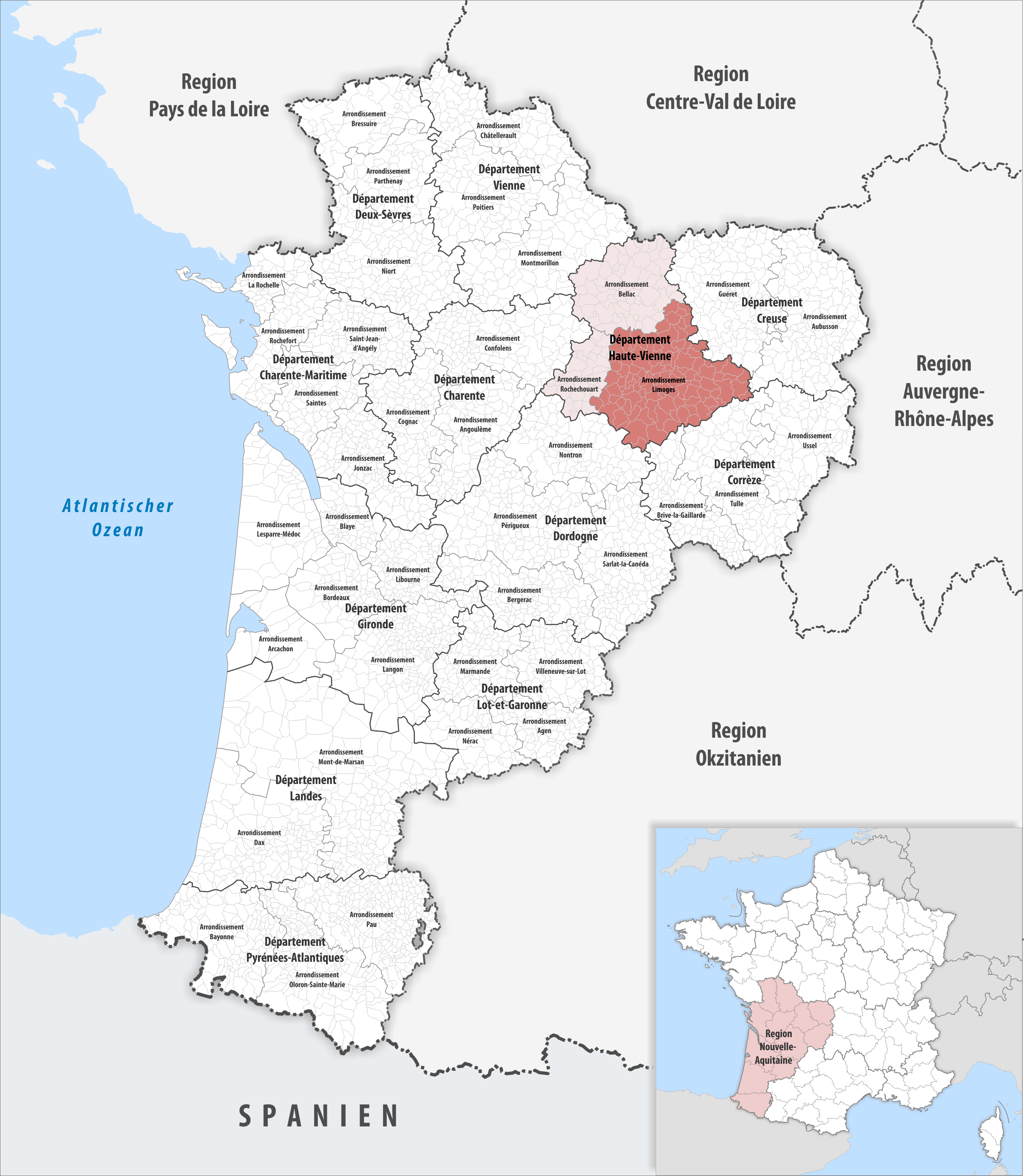 Lage des Arrondissements Limoges